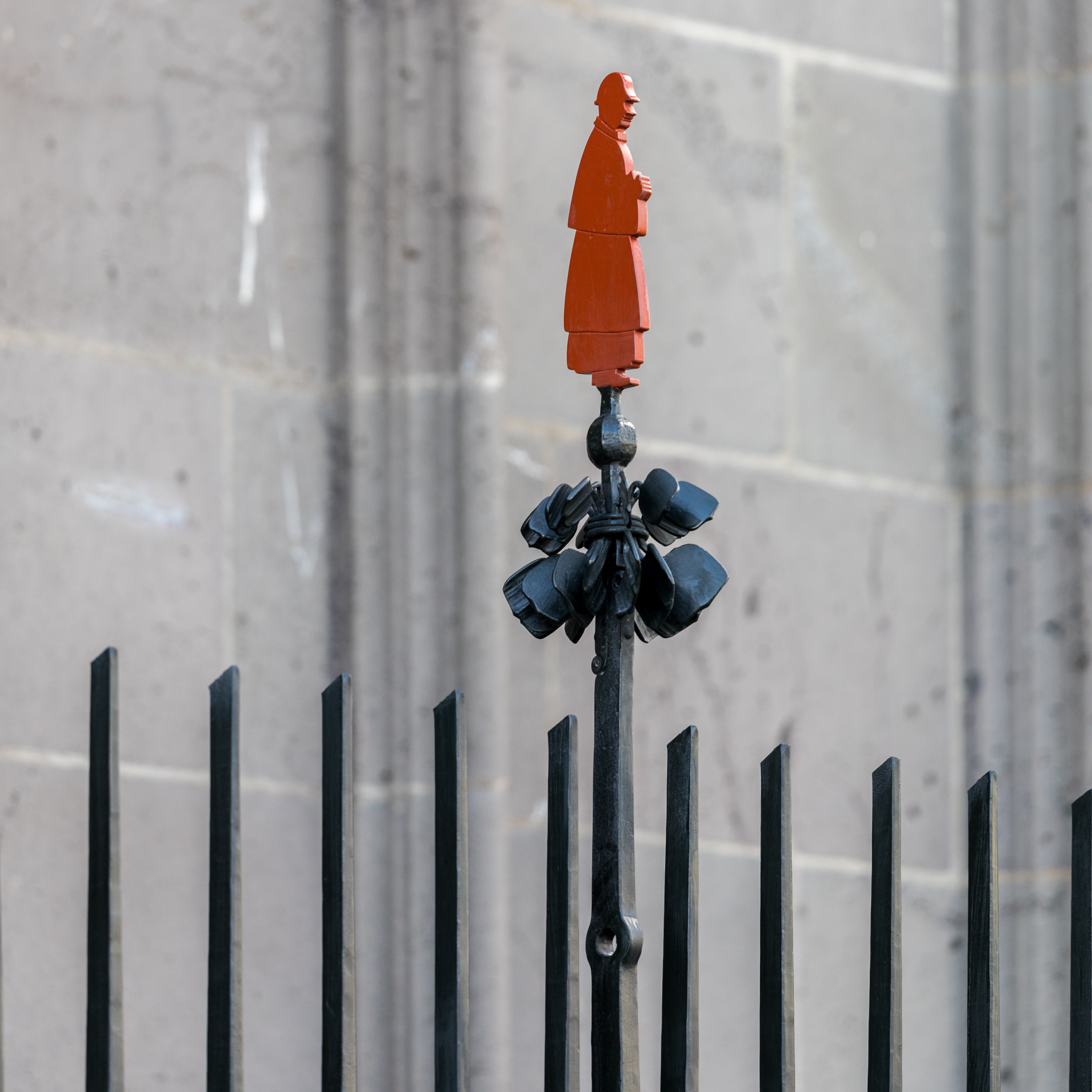 Gitter an der Nordseite des Kölner Domes, von Paul Nagel. Fertiggestellt und eingeweiht im Juni 2020 Detail: Skulptur, die den Dompropst emeritus Gerd Bachner mit Schutzhelm darstellt. Dies erinnert an seine Besteigung der nördlichen Kreuzblume 2015, im Jahr seines Amtsantritts als Dompropst.